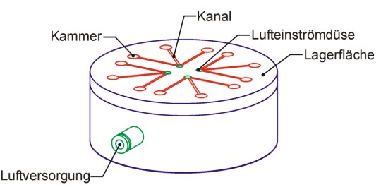 Konventionelles Düsen Luftlager